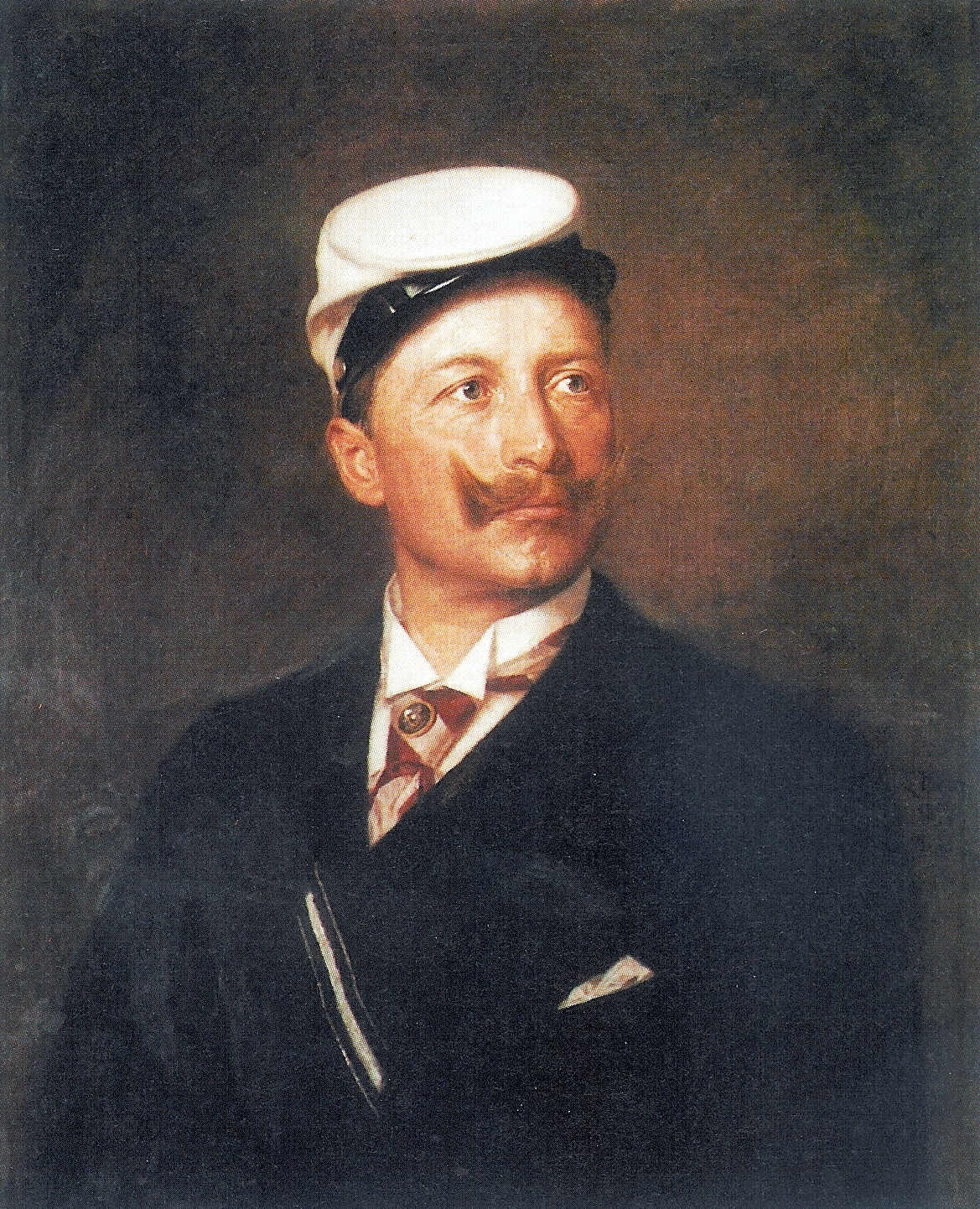 Kaiser Wilhelm II. als Alter Herr der Bonner Preußen (Corps Borussia Bonn)